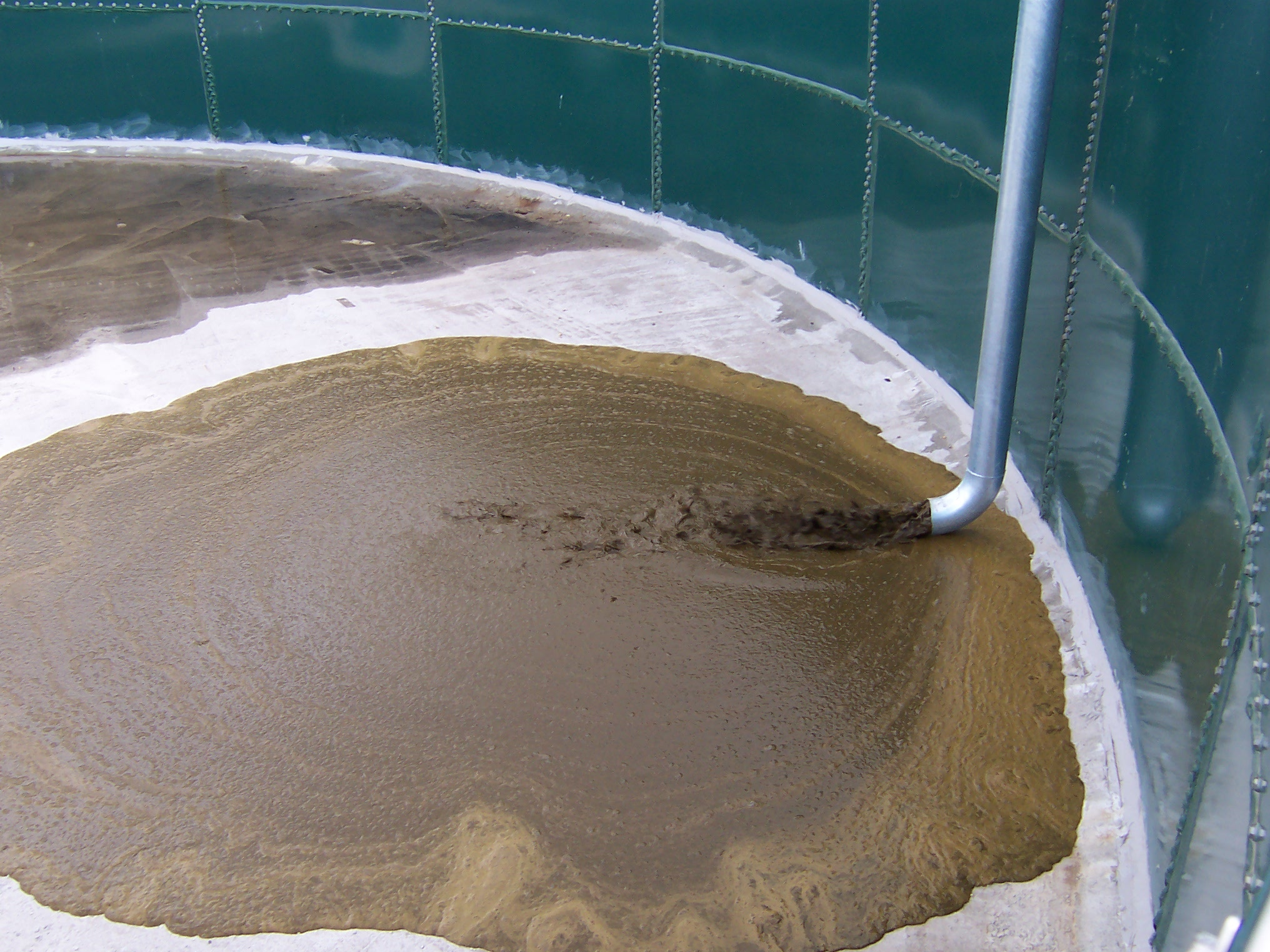 Frische Gülleeinfüllung in ein offenes Güllesilo